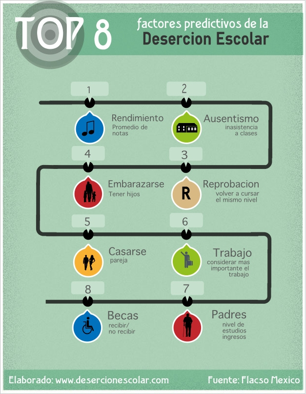 factores predictivos de la deserción escolar, segun orden de importantancia